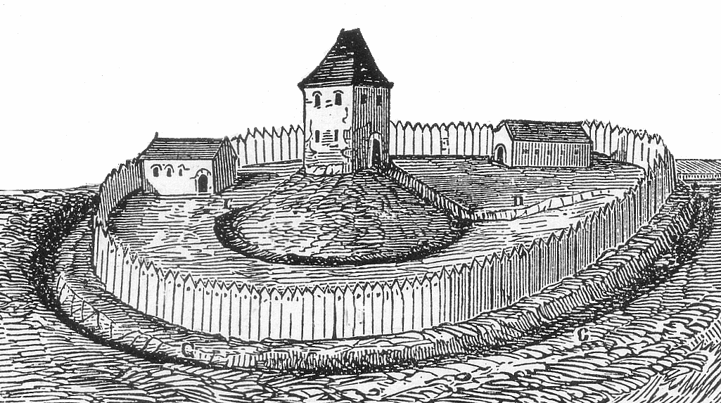 Motte, Idealbild einer Turmhügelburg